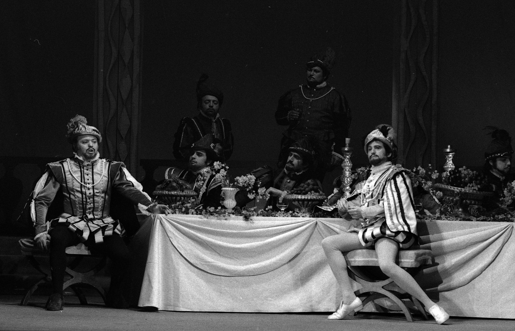 Théâtre du Capitole. Le 18 Octobre 1972. Vue de la représentation des Huguenots au théâtre du Capitole.